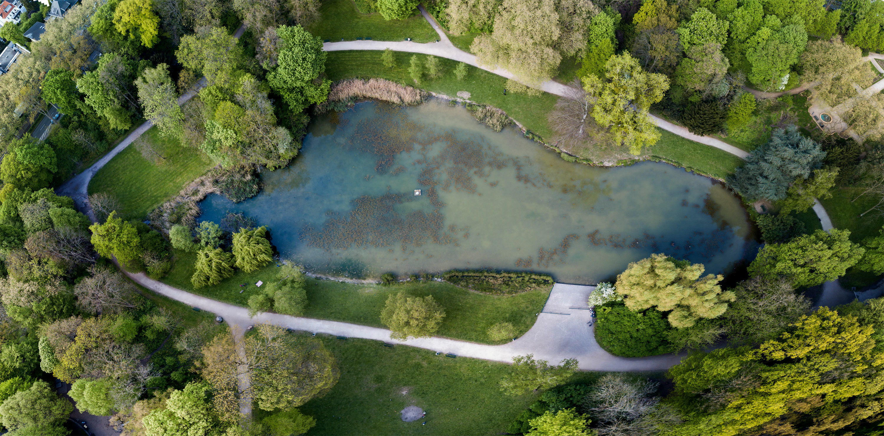 Der im Südwesten im Stadtteil Klettenberg gelegene Park im Frühling 2017. Aufgenommen mit einer Drohne.